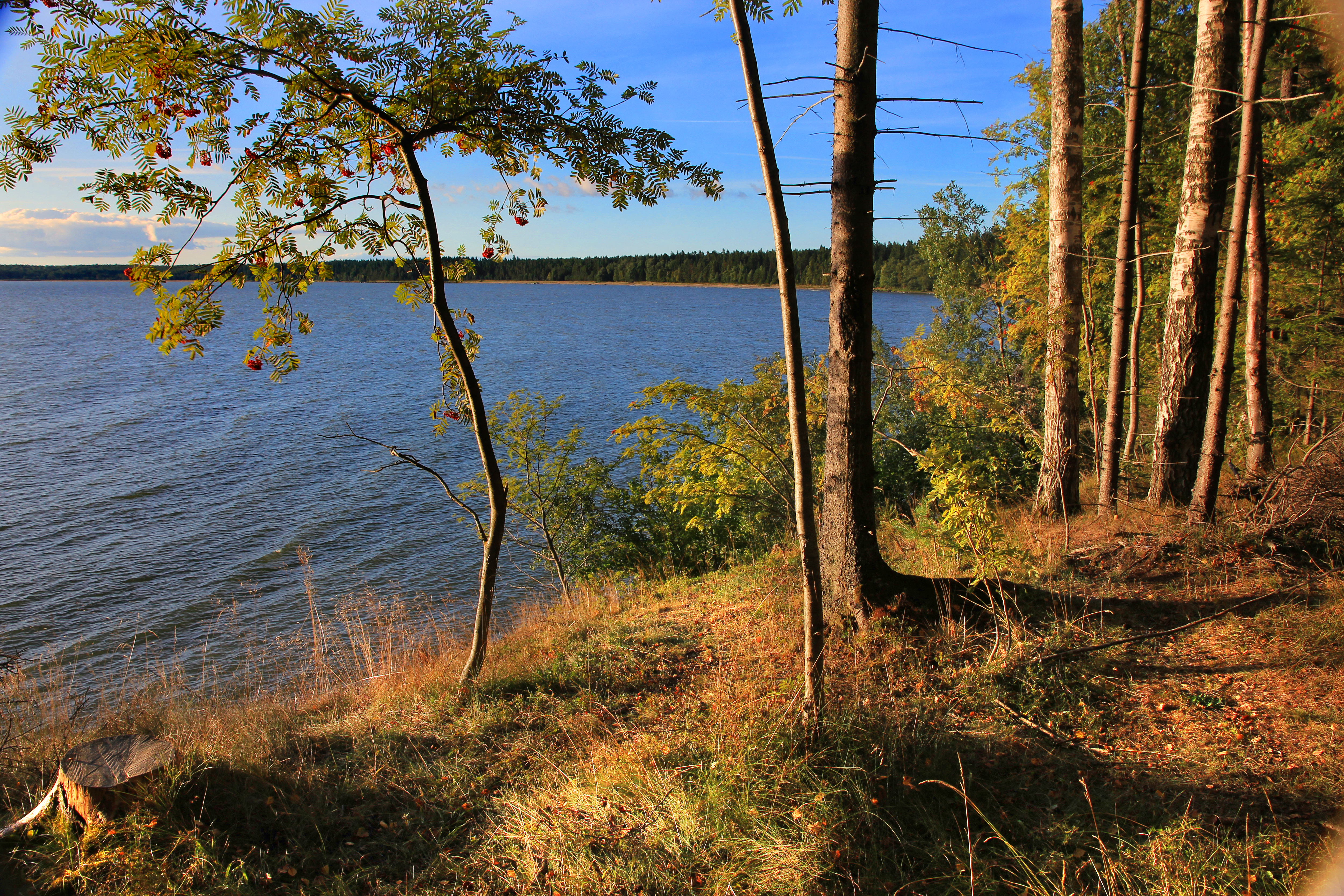 Vaade Hara lahele kõrgelt kaldalt, mis jääb tuletornist 100 m idasse.